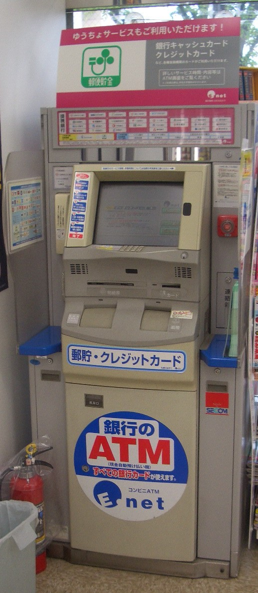 E-net ATM